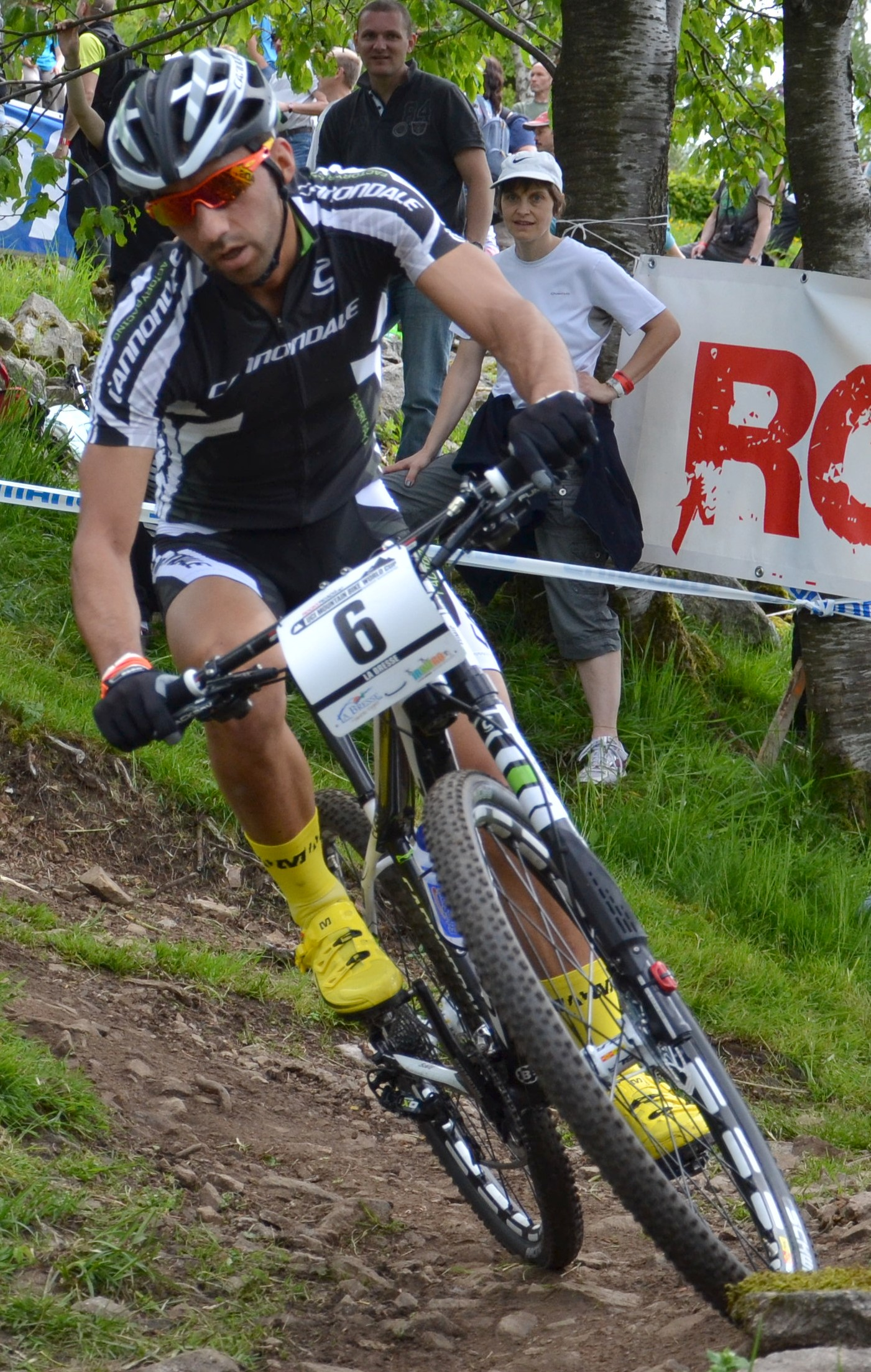 Manuel Fumic lors de la 4e manche de la coupe du monde de VTT 2012 à La Bresse (FRA).